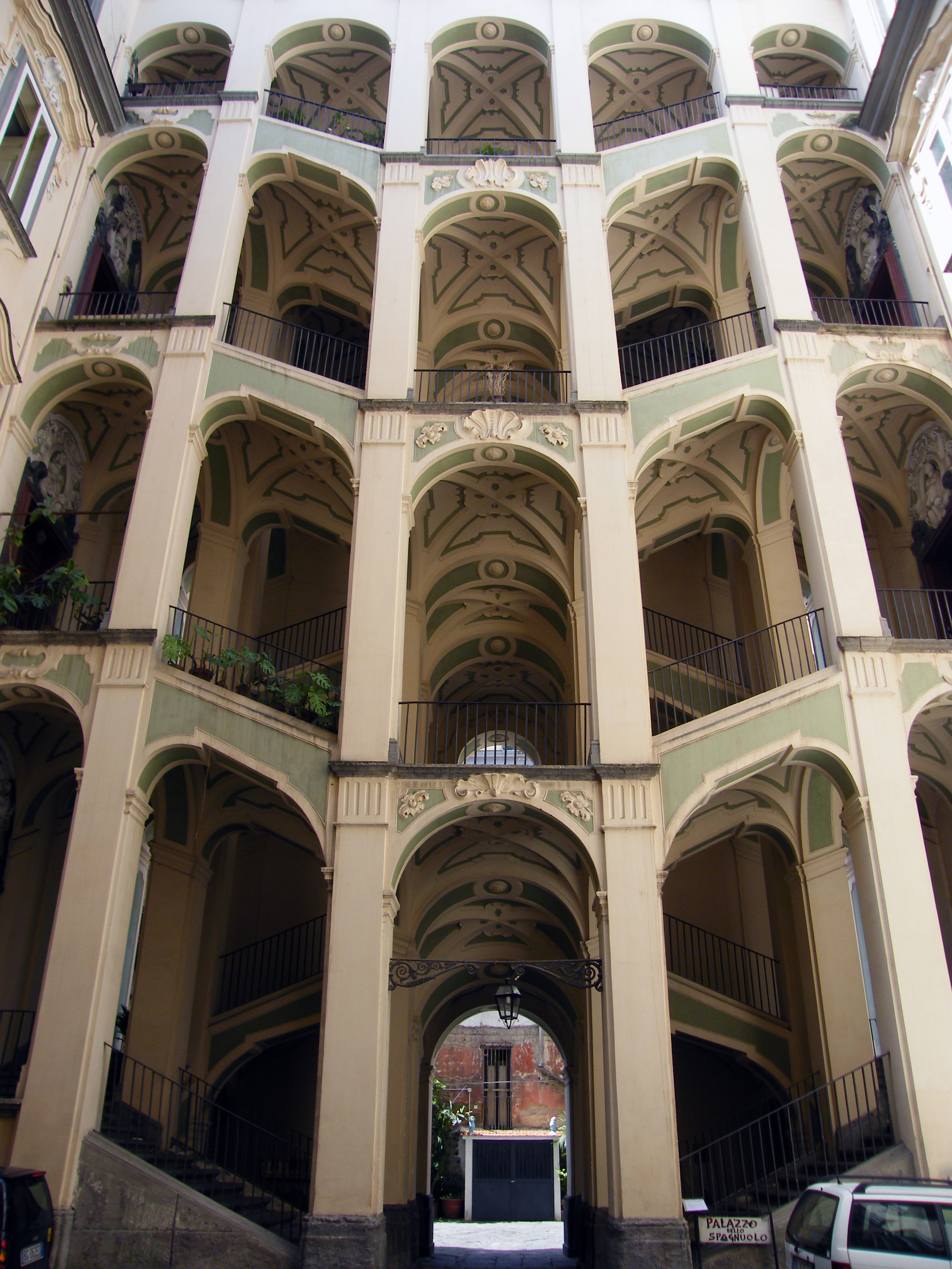 Napoli - Vico Vergini Palazzo dello Spagnuolo